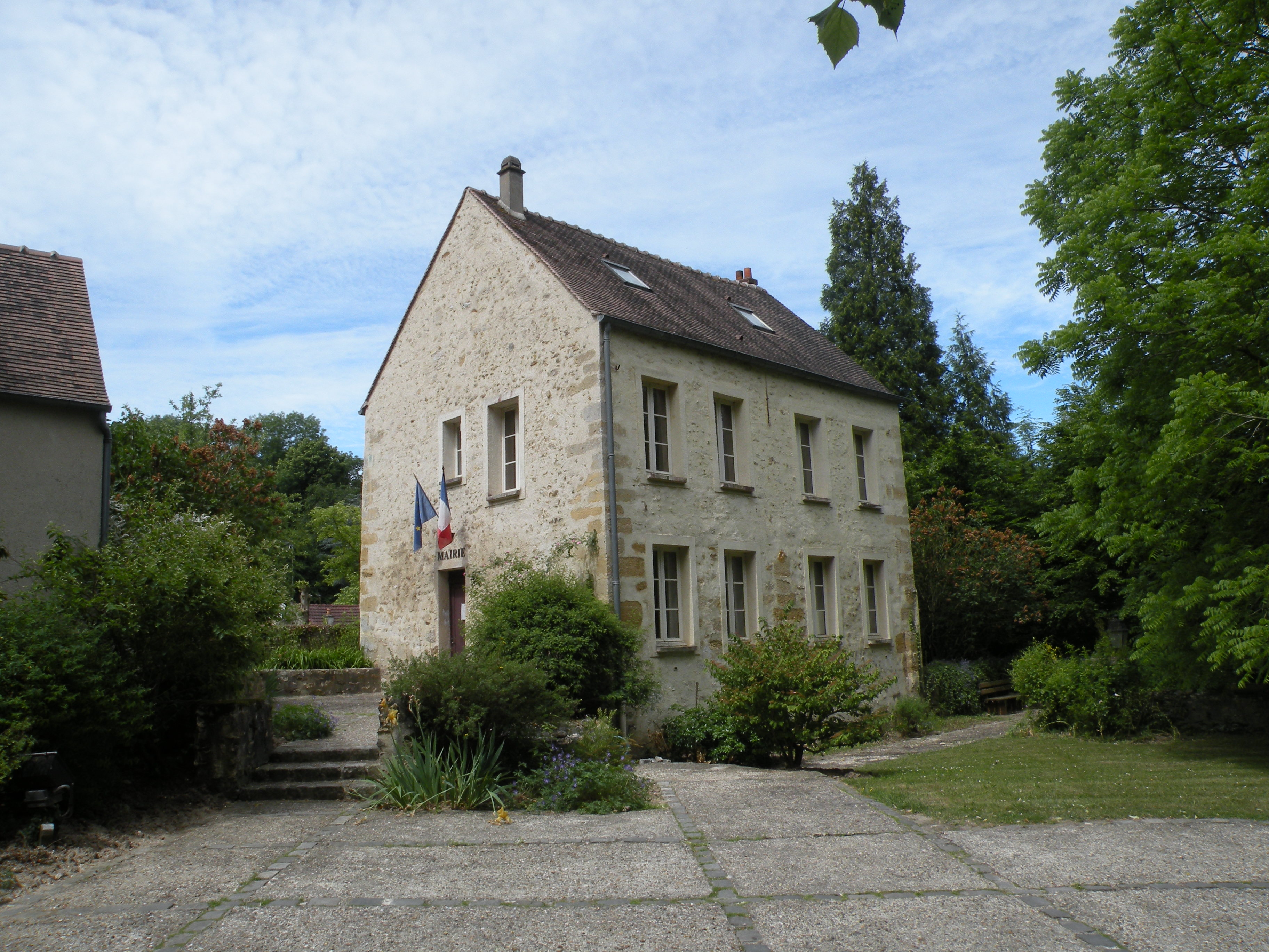 mairie de Boisemont (Val-d'Oise)